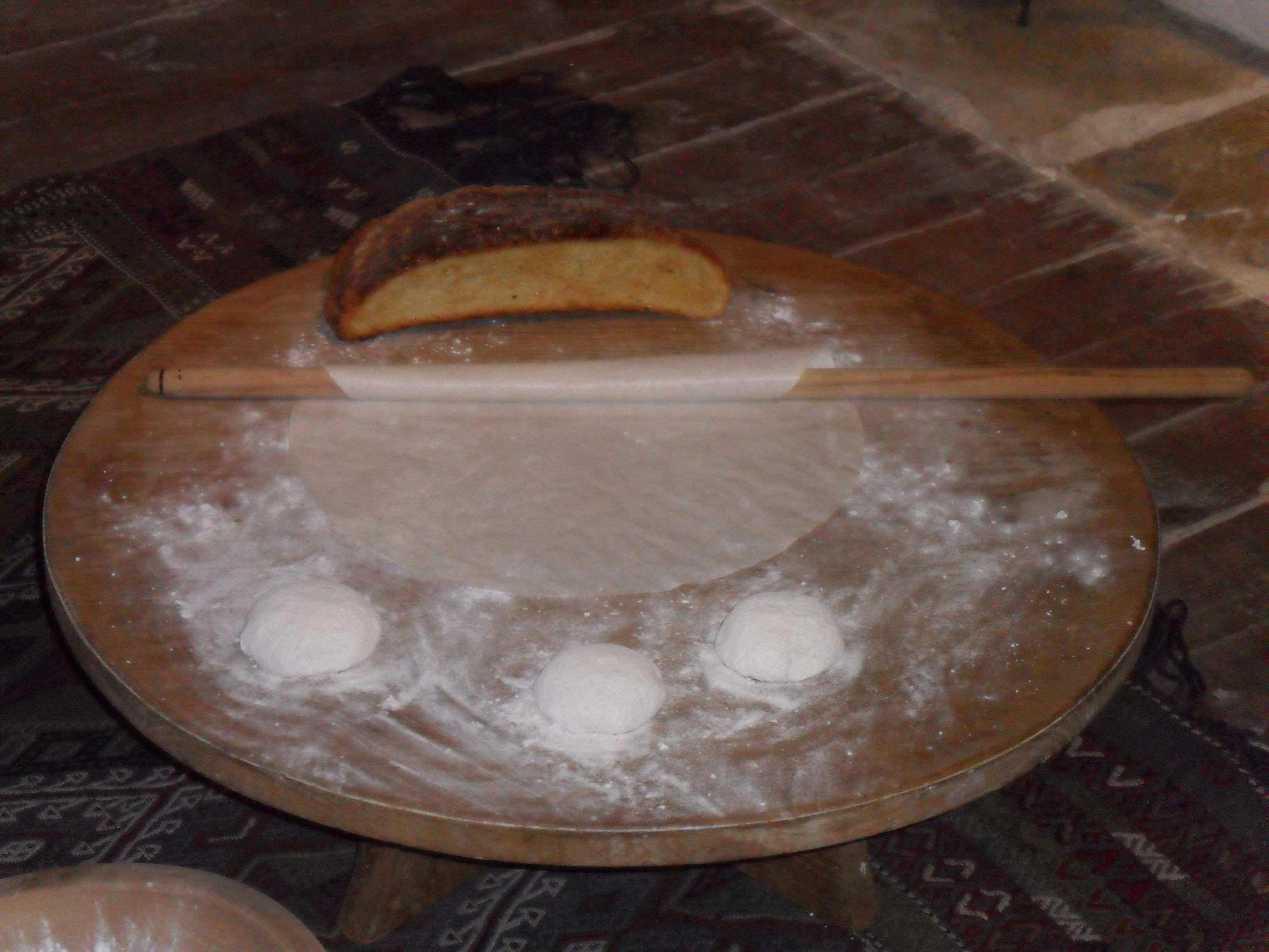 Samsun Kent Müzesi'nde hamur açma sahnesi.